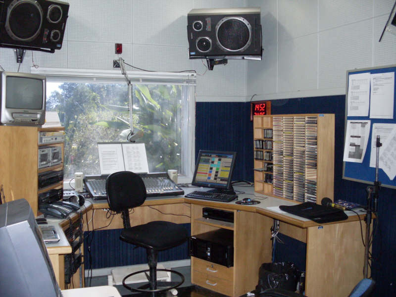 Estúdio da Rádio Atlântida FM em Criciúma, SC.